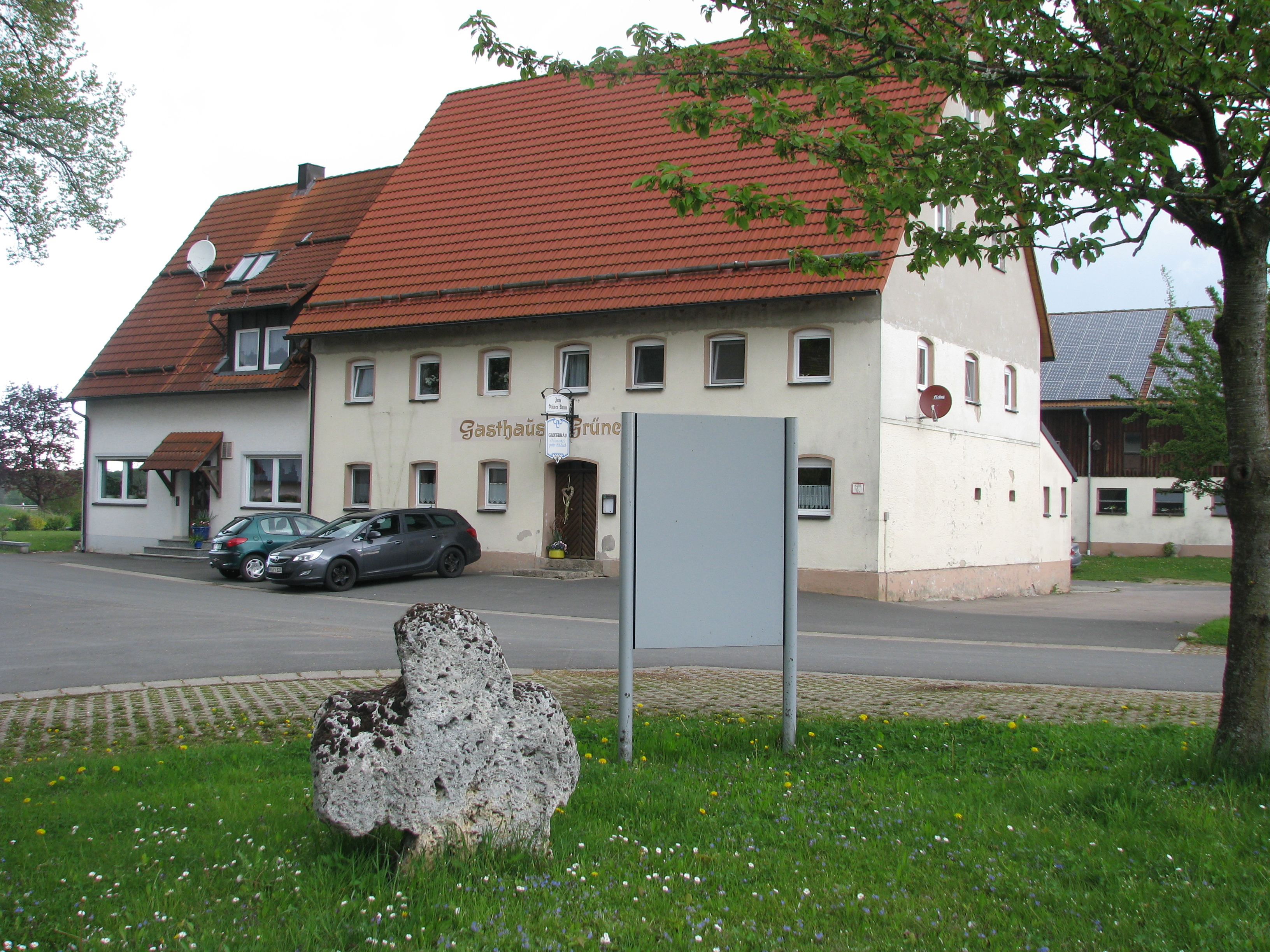 Reicheltshofen, Ortsteil der Gemeinde Berg bei Neumarkt in der Oberpfalz, Wirtshaus und Steinkreuz